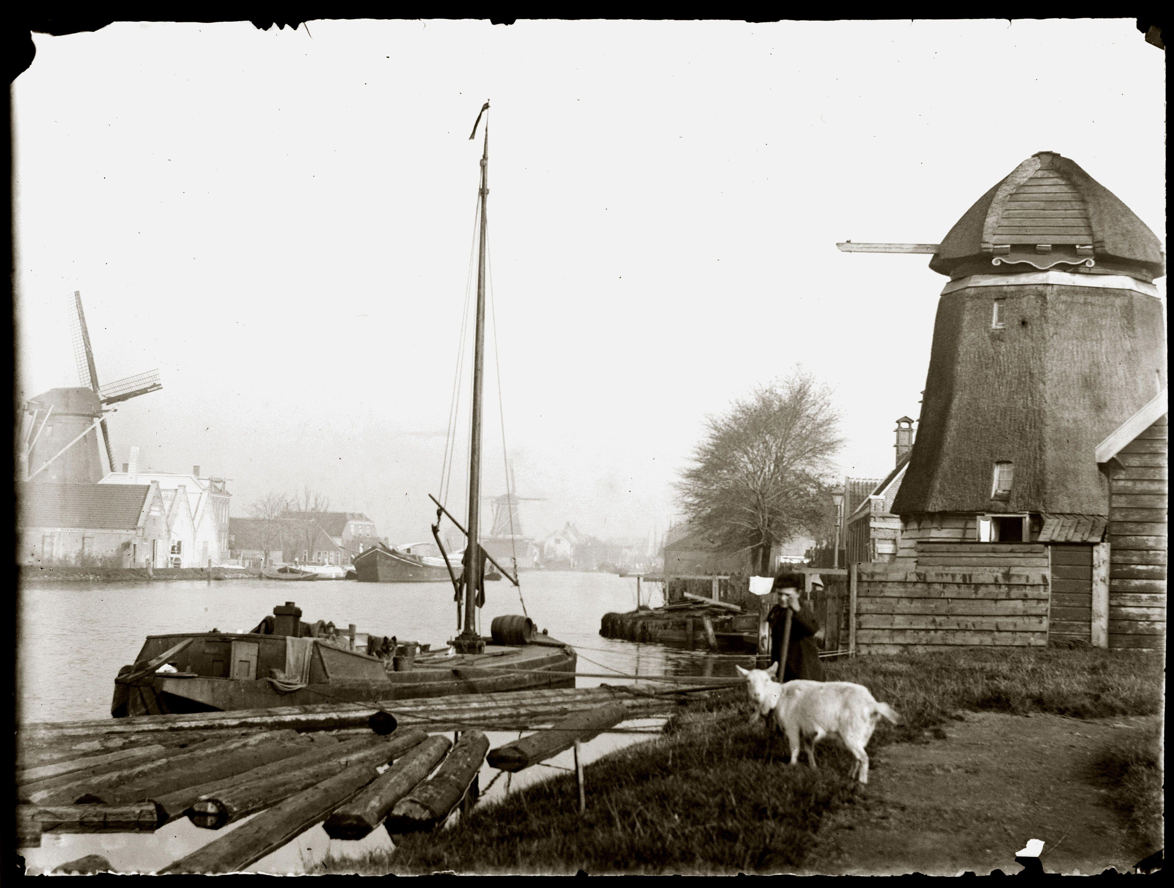 Beschrijving Kostverloren Wetering Thans Kostverlorenvaart. Industriemolen 'de Eendracht'``, krijtmolen 'de Hoop' en de romp van de molen van de Stads- en Godshuispolder. Documenttype foto Vervaardiger Olie``, Jacob (1834-1905) Collectie Collectie Jacob Olie Jbz. Datering 1890 Geografische naam Kostverlorenvaart Inventarissen Afbeeldingsbestand 10019A000783 Generated with Dememorixer